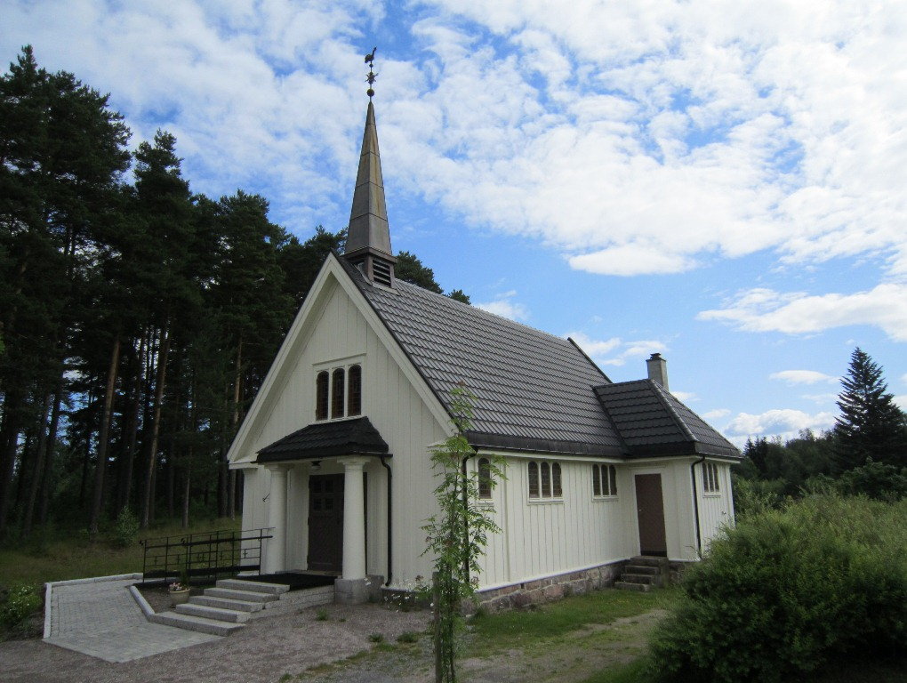 Gravkapellet (ark. Thorvald Astrup, 1911) ved Våler kirke i Hedmark